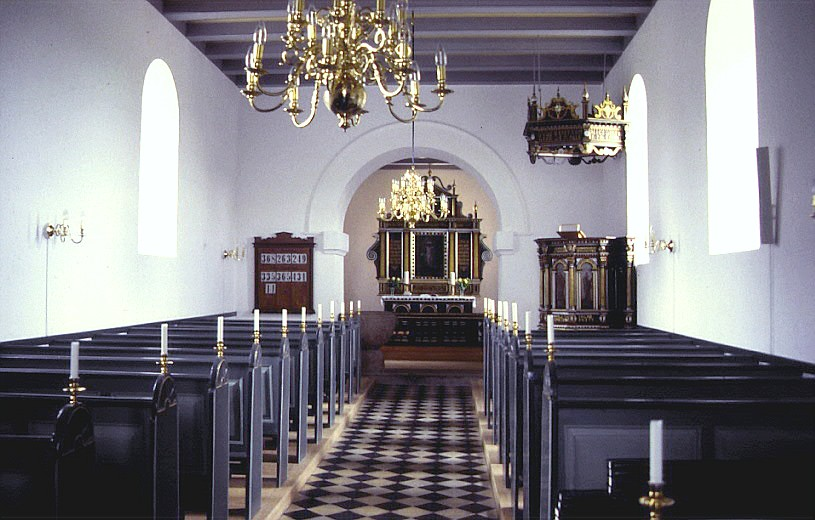 Skovby kirke Kirkerummet Skovby kirke ligger i Skanderborg Kommune (før 2007 Galten Kommune); indtil Kommunalreformen i 1970 lå det i Framlev Herred (Århus Amt Østjylland). Apsis, kor og skib er opført i romansk tid af granitkvadre